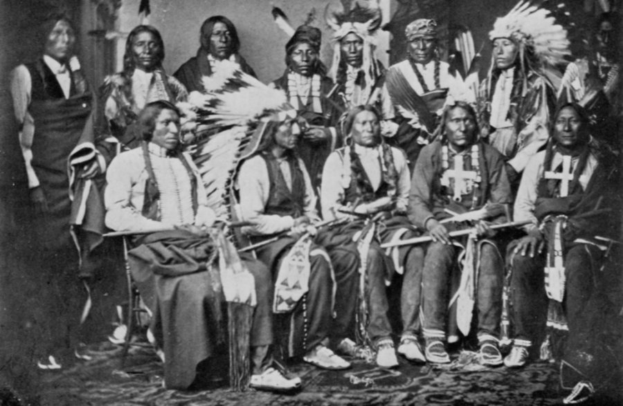 Häuptlinge der Sioux 1877 (urheberrechtsfrei)